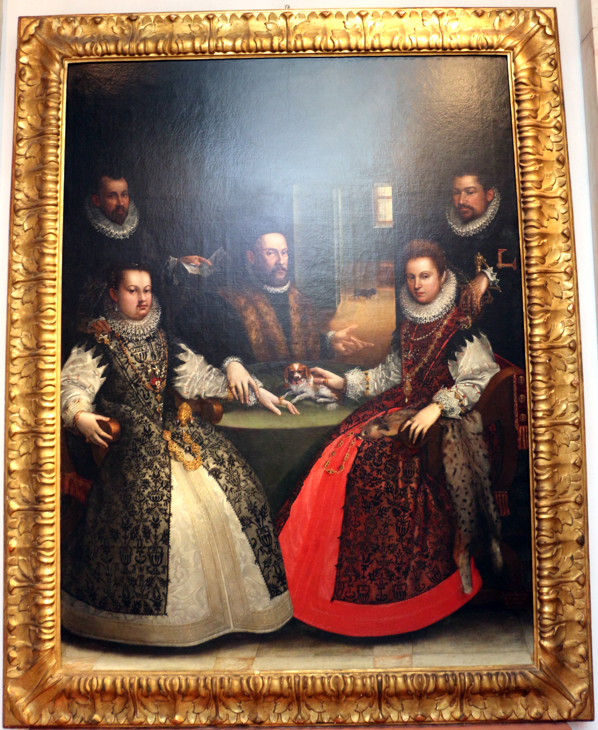 Pinacoteca Nazionale di Bologna This is a photo of a monument which is part of cultural heritage of Italy.